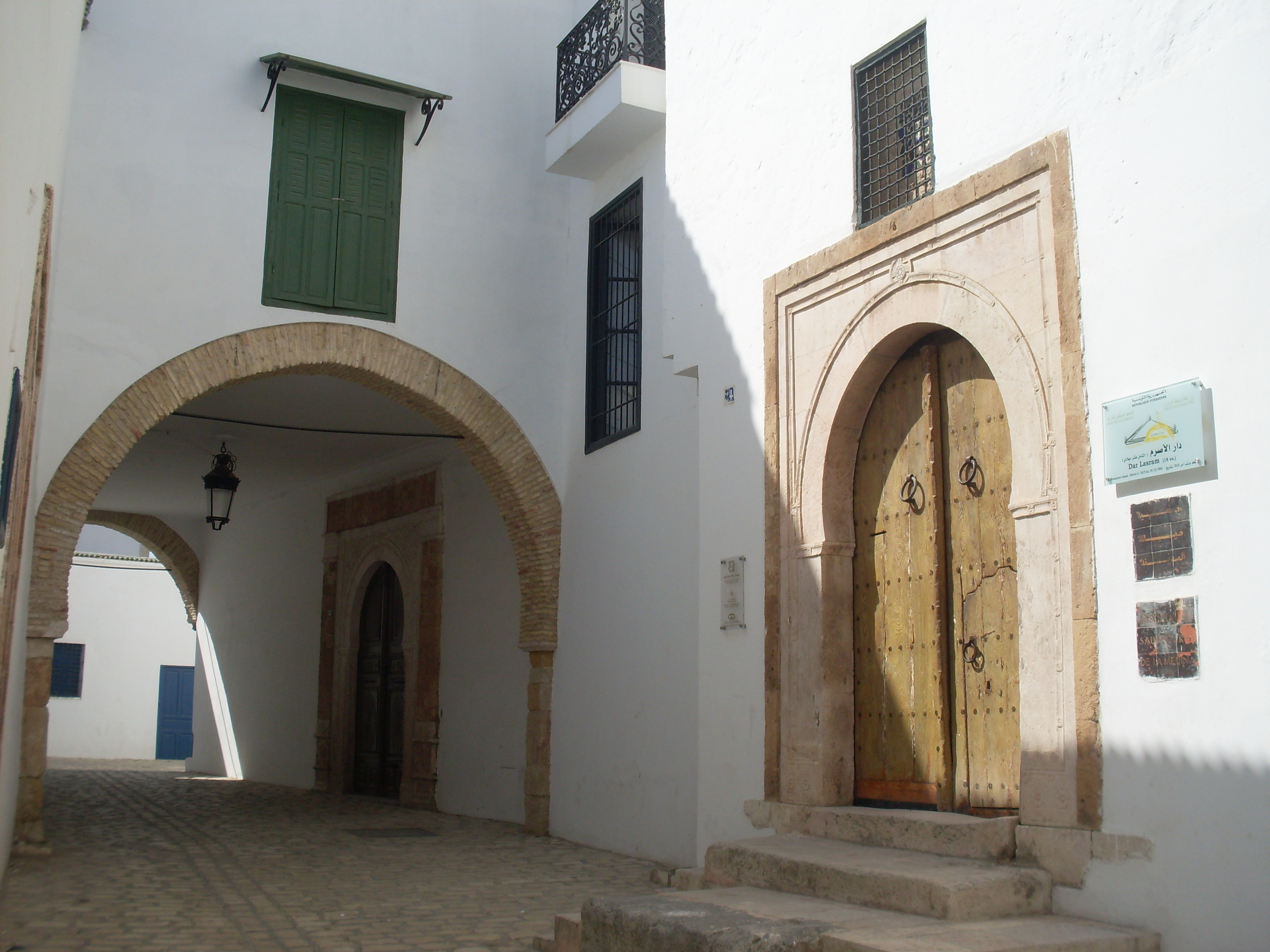 Medina de Tunis, Dar Lasram